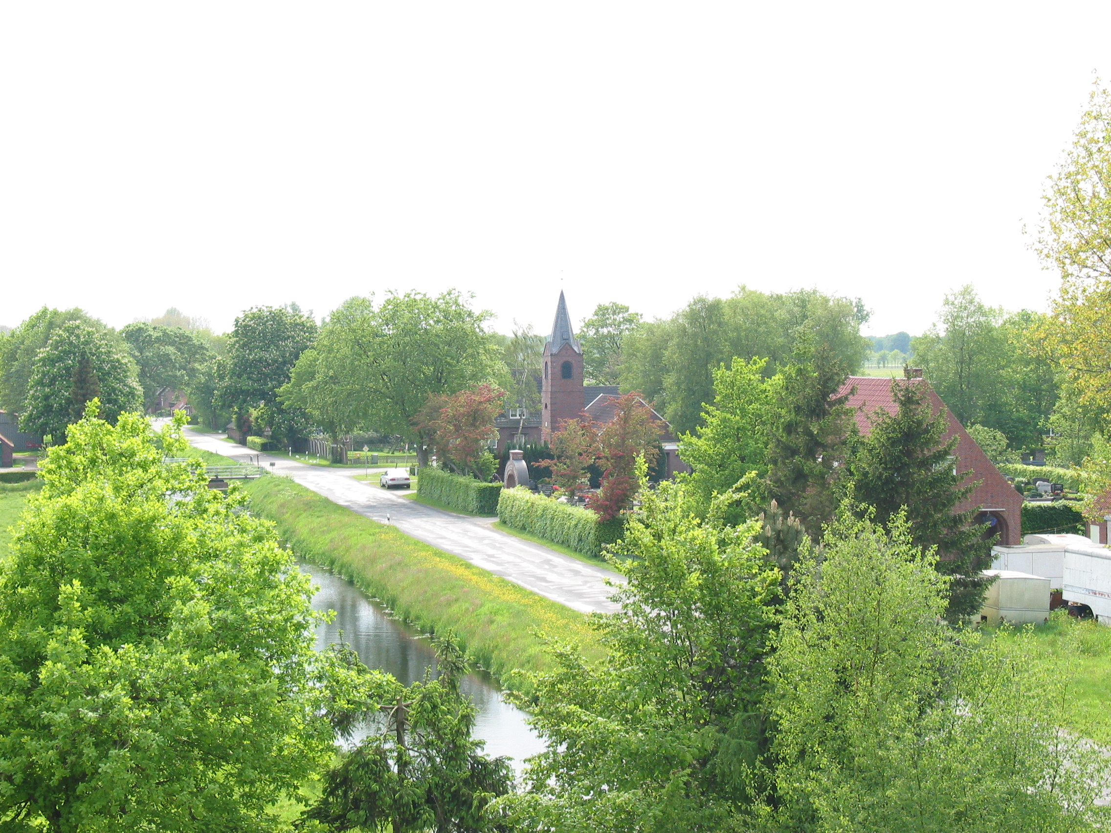 Ausblick von der Mühle Spetzerfehn auf die Friedhofskapelle